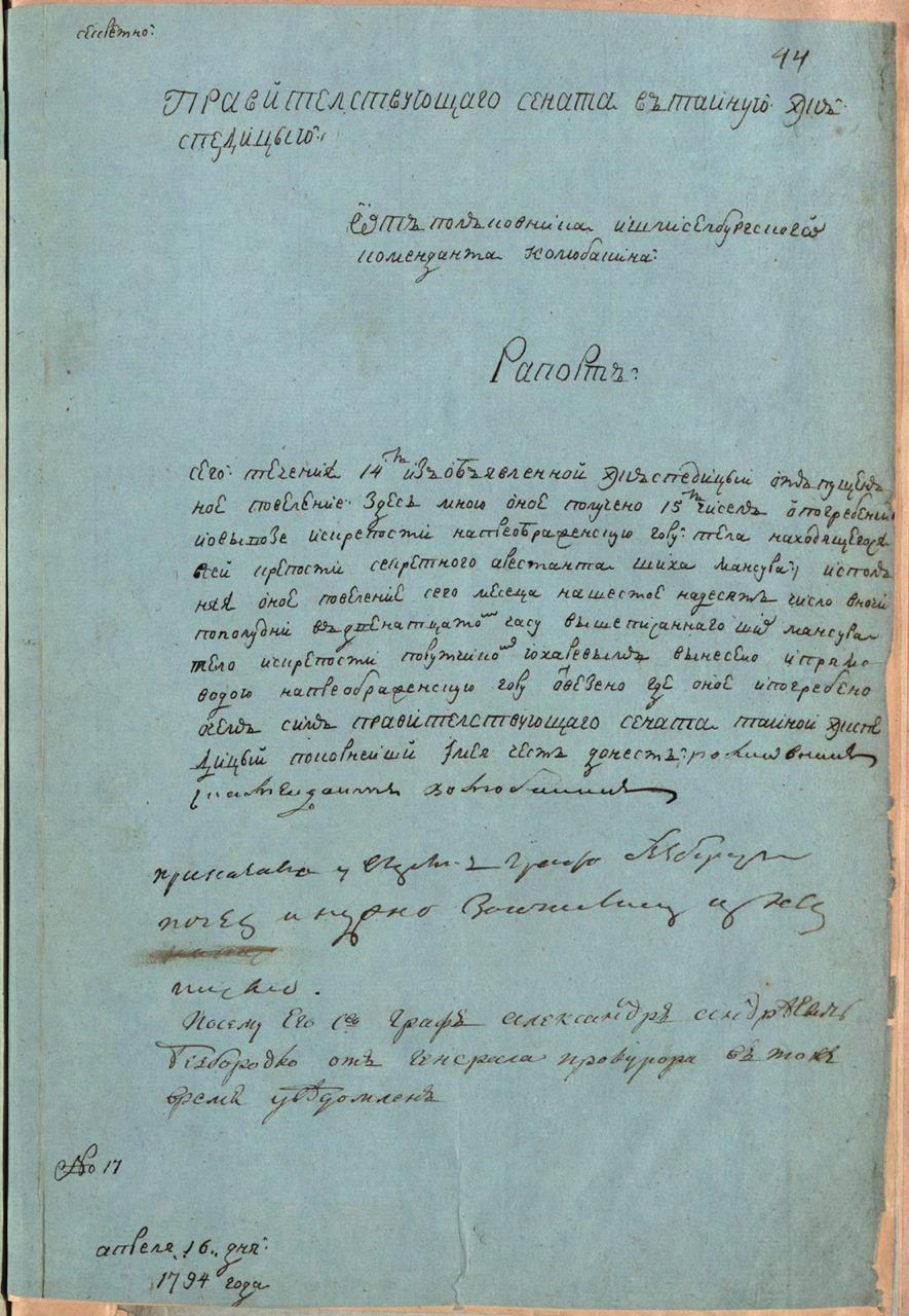 Приказано уведомить графа Безбородко, о чем и нужно (нрзб.) письмо. Посему его превосходительство граф Александр Андреевич Безбородко от генерал-прокурора в то же время уведомлен. № 17 апреля 16-го дня, 1794 года.